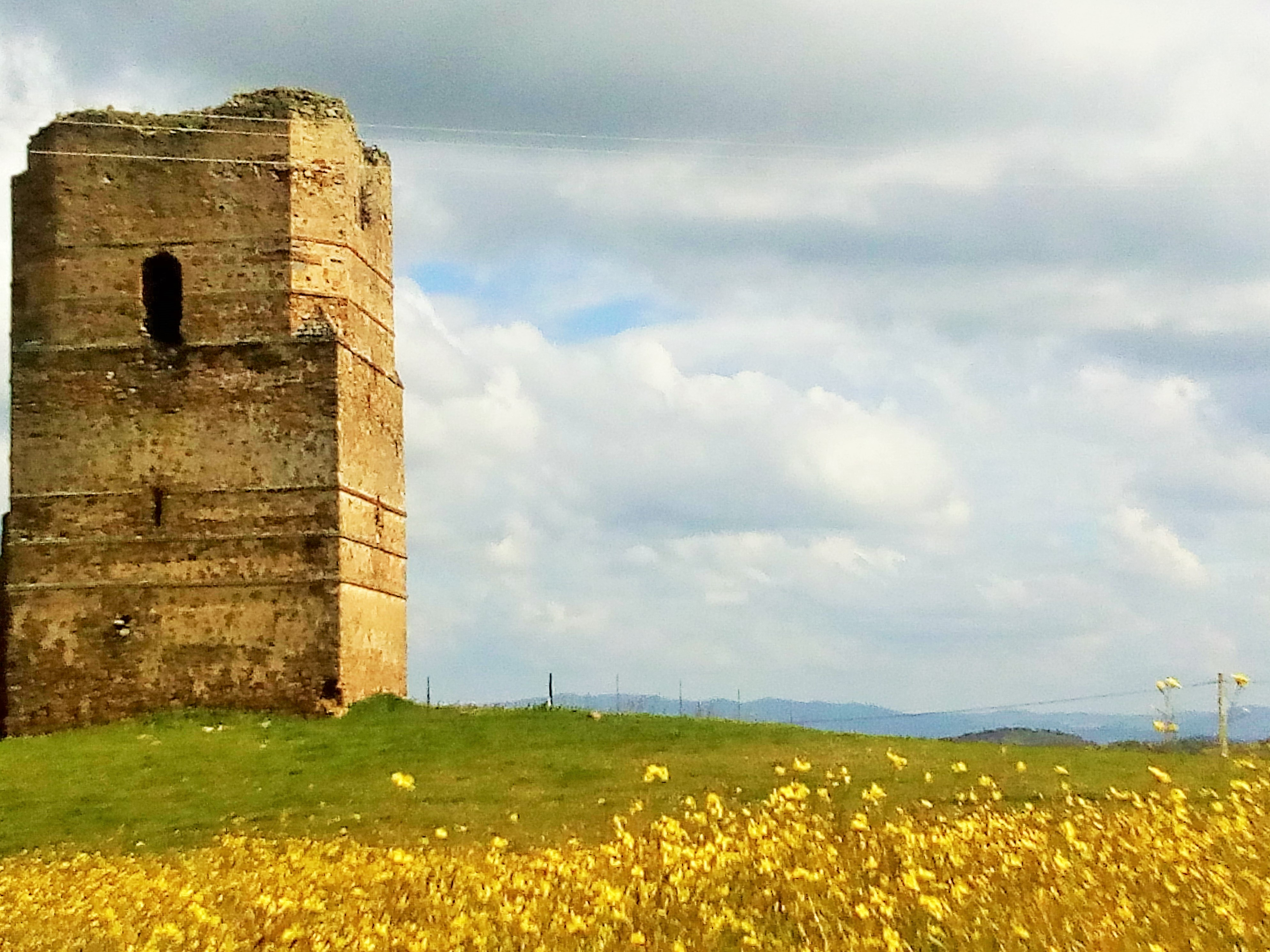 Torreón Defensivo del siglo XV construido por Alonso de Cardenas conocido como El Castillo 6 (2)